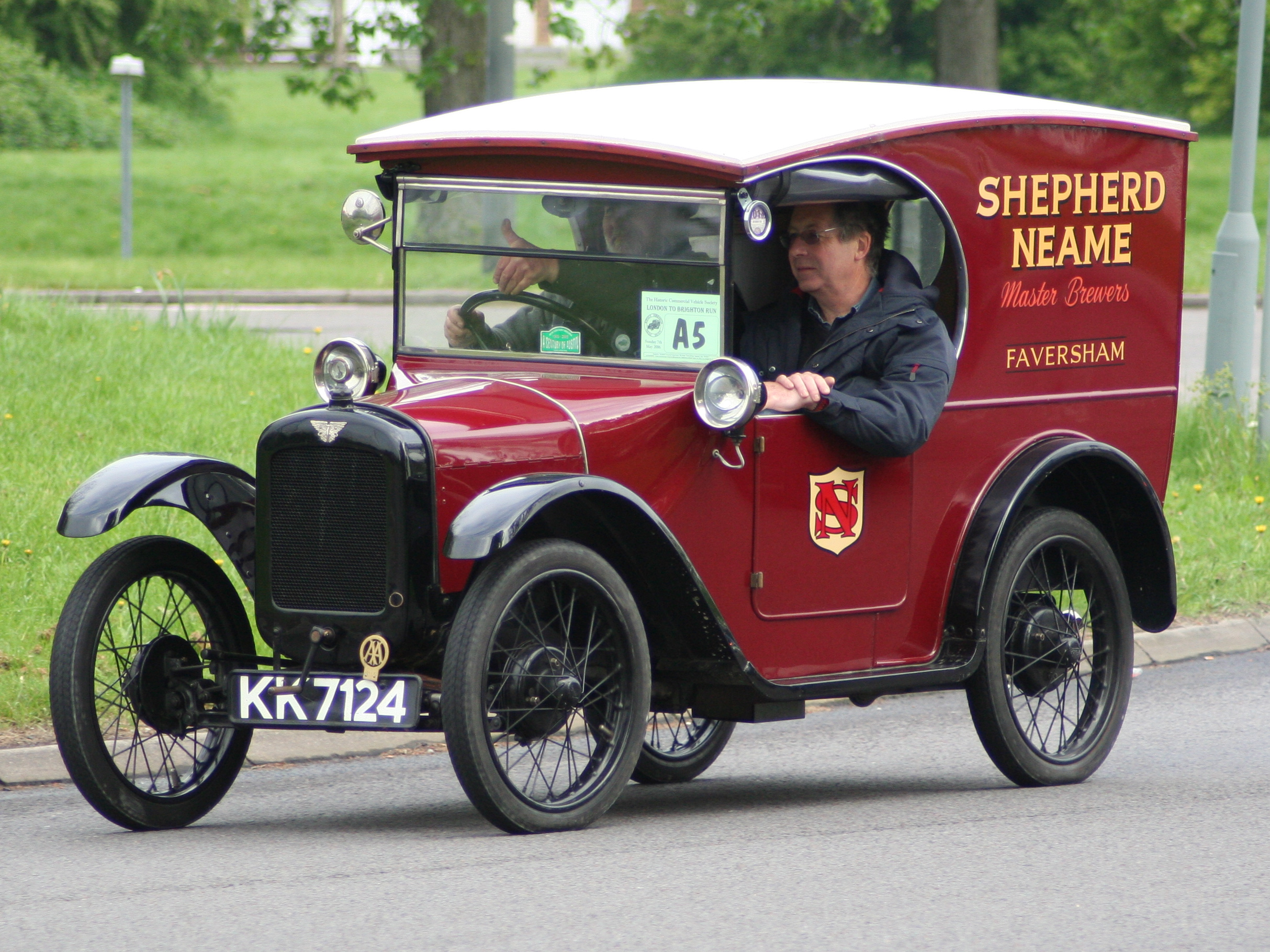 Austin Seven van